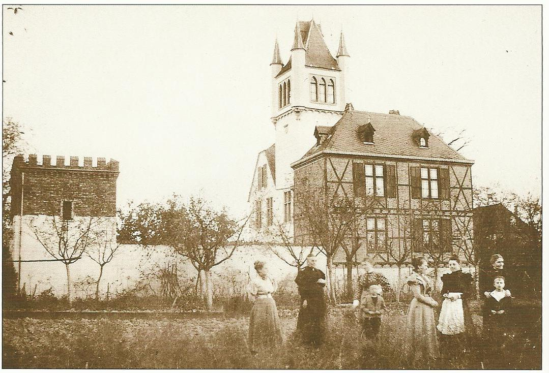 Ehemaliger kurkölnischer Bischofshof, Honnef